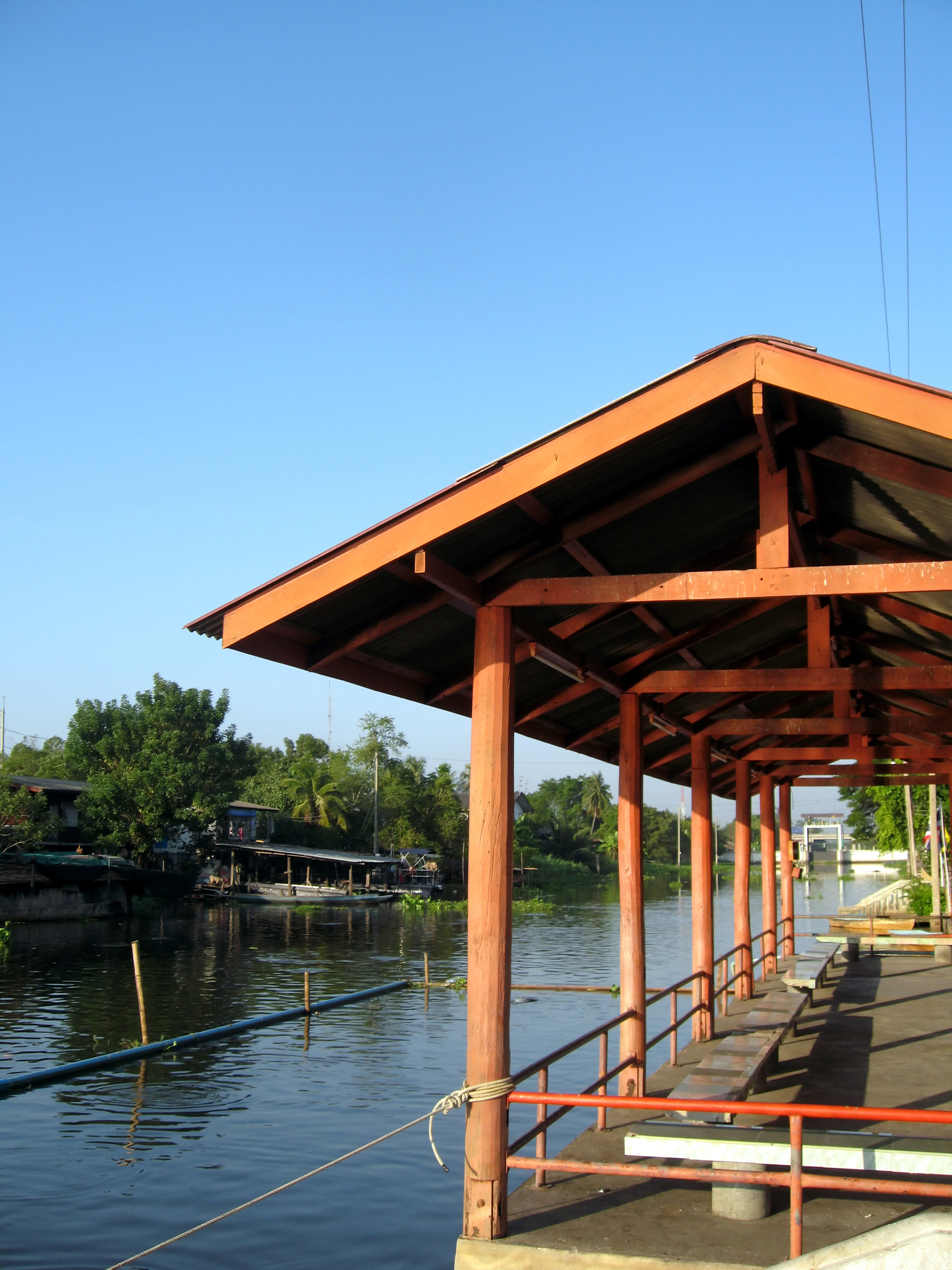 ท่าน้ำหน้าวัดลาดกระบัง